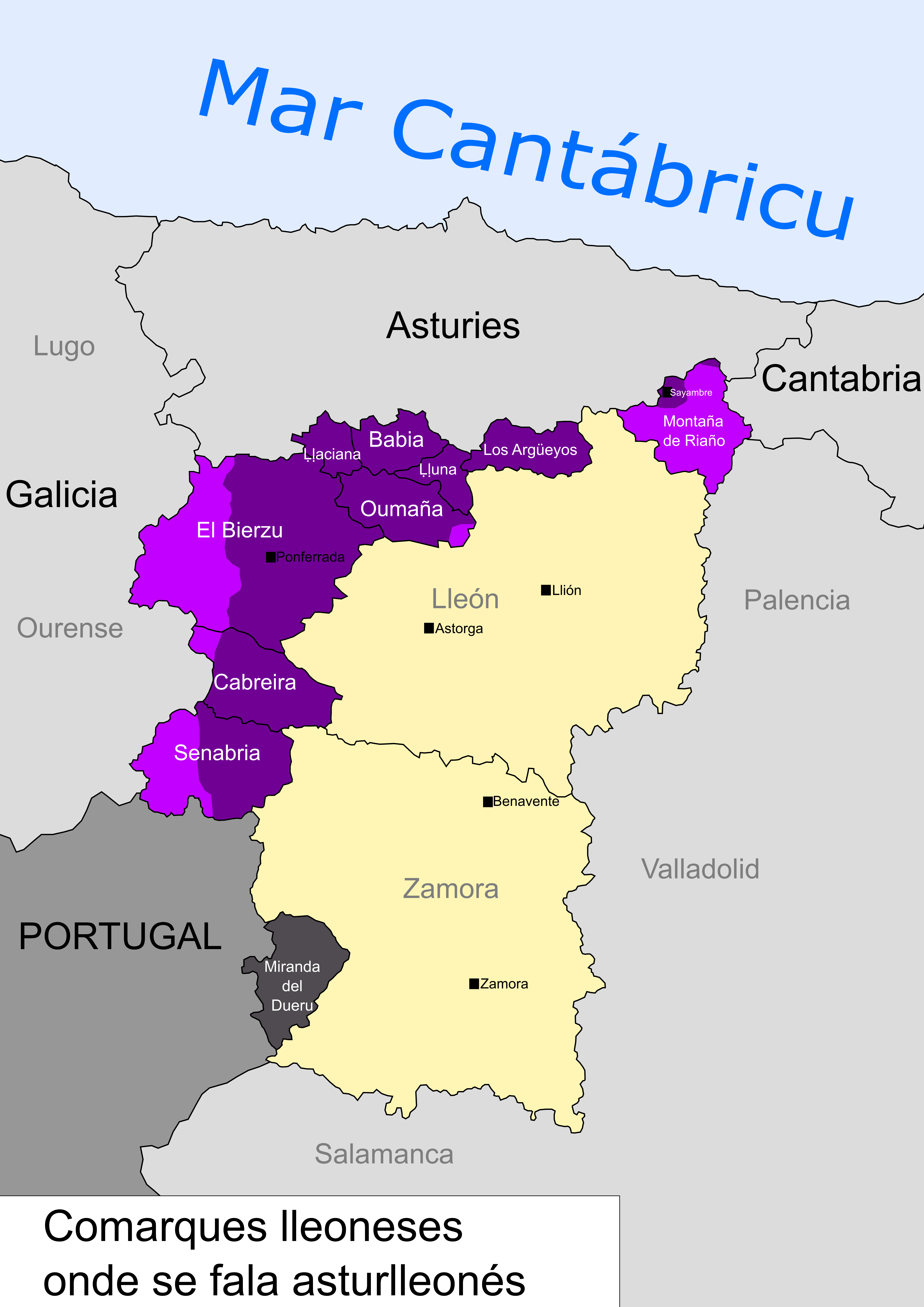 Mapa de les comarques lleoneses onde se fala asturlleonés